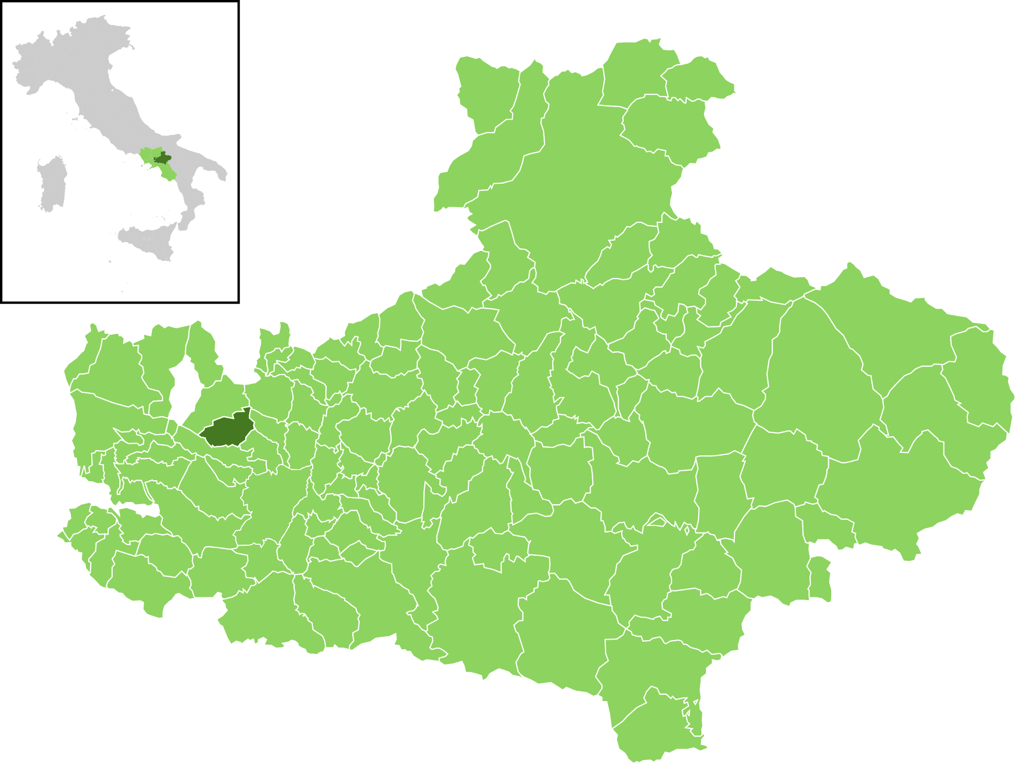 Posizione del comune all'interno della provincia di Avellino